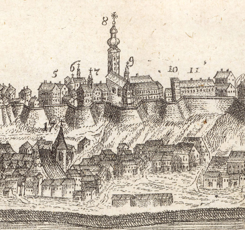 Buda, Halászbástya és a Mátyás templom Binder János rézkarcának részletén. XVIII. sz utolsó évtizedében.